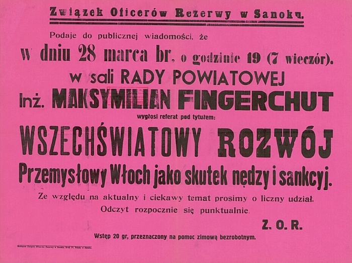 Afisz na referat of Maksymilian Fingerchut in Sanok